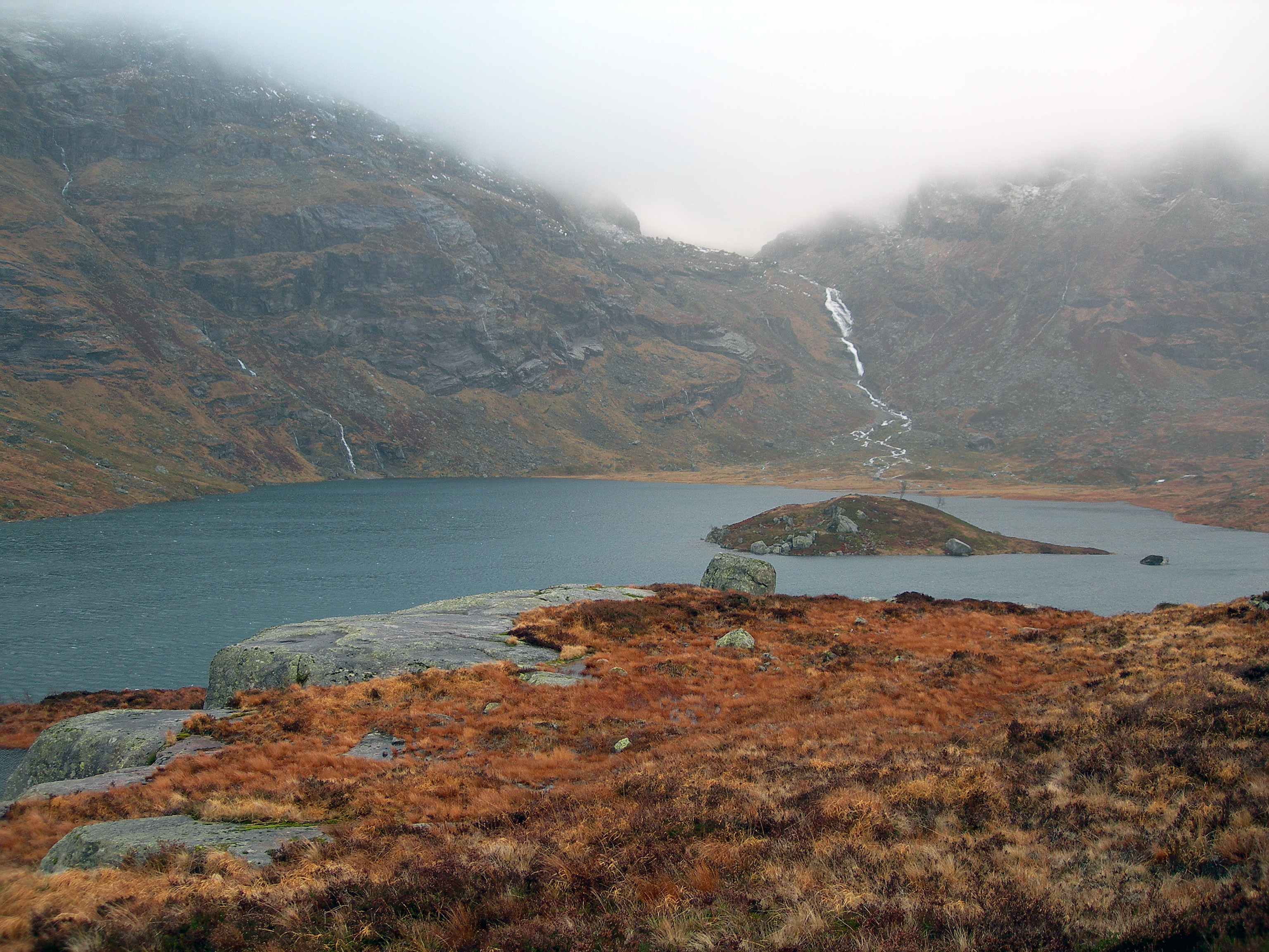 The lake Fossdalsvatnet and the river Nordskarelva in Åbødalen, Sauda